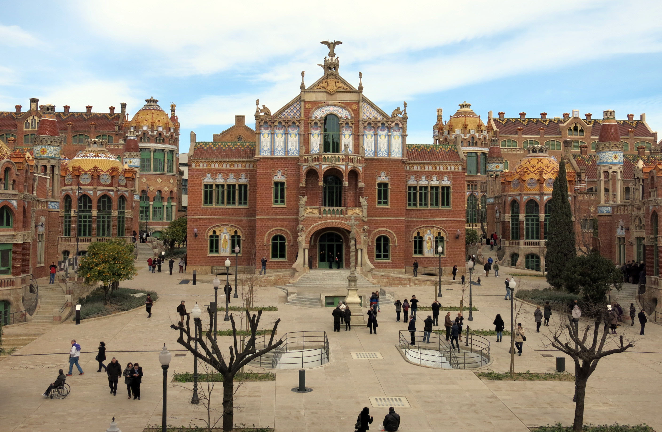 Hospital de la Santa Creu i Sant Pau (Barcelona)